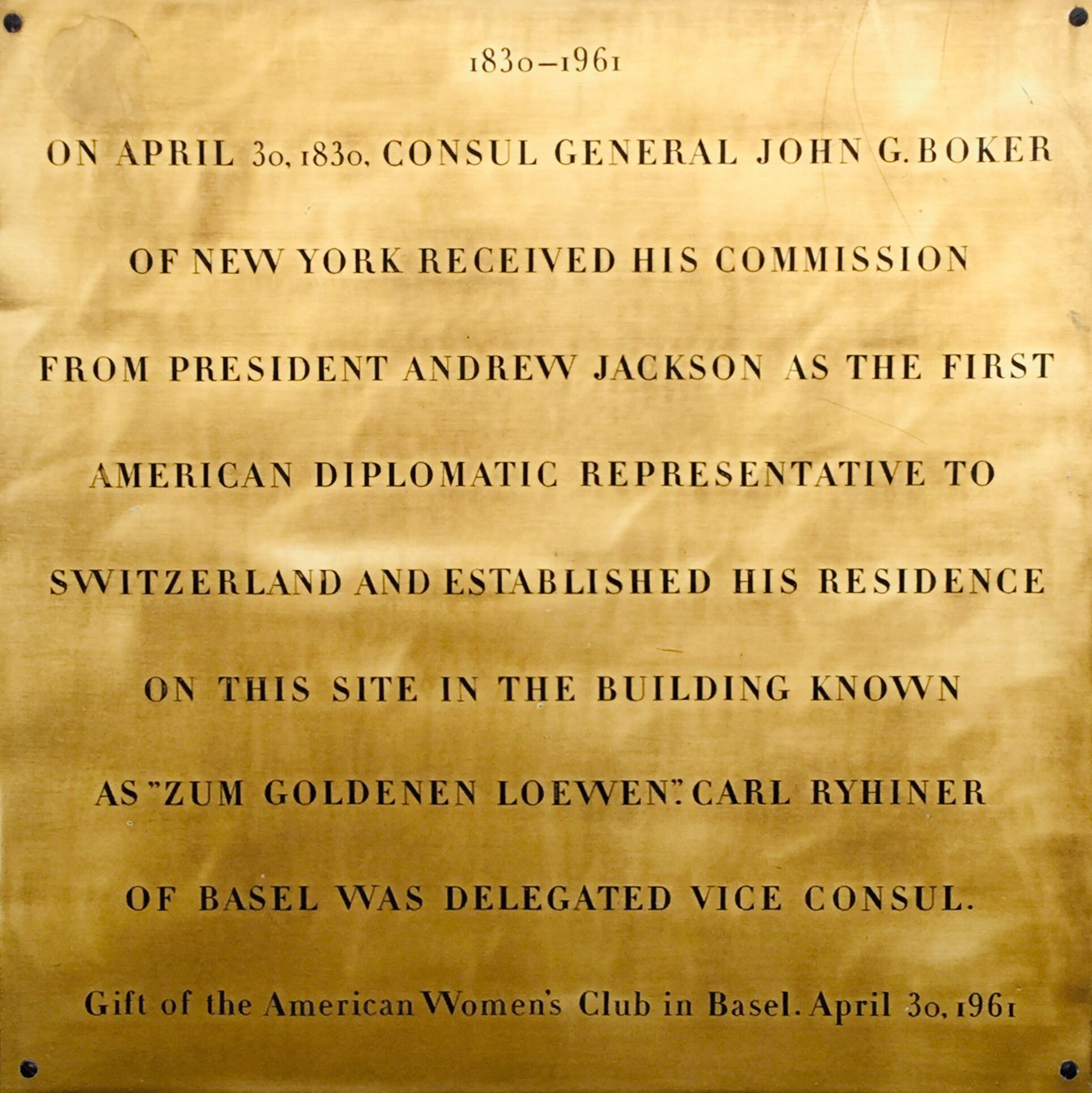 Erinnerungsplakette zum Standort zur ersten amerikanischen diplomatischen Vertretung in der Schweiz in Basel